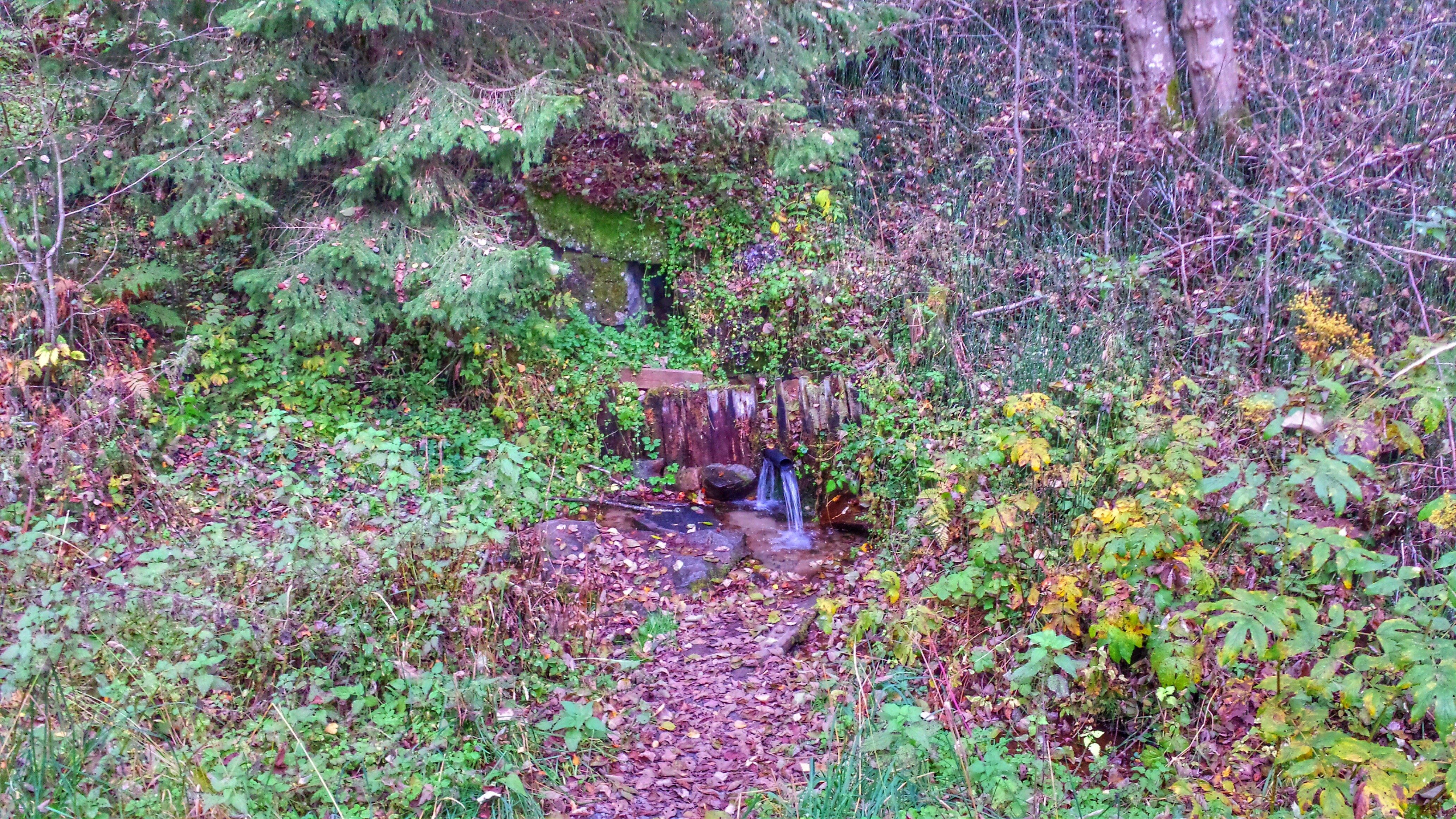 Kaldbekk er en rennende grunnvannskilde som kommer til dagen like ovenfor byggefeltene på Begnamoen, like i veikanten langs Hofsfossveien i Ringerike kommune, Buskerud, Norge.